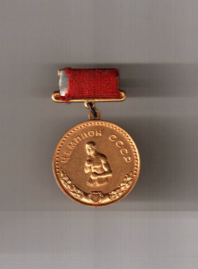 Медаль за первое место в чемпионате СССР по боксу. Белоусов Валерий Павлович.